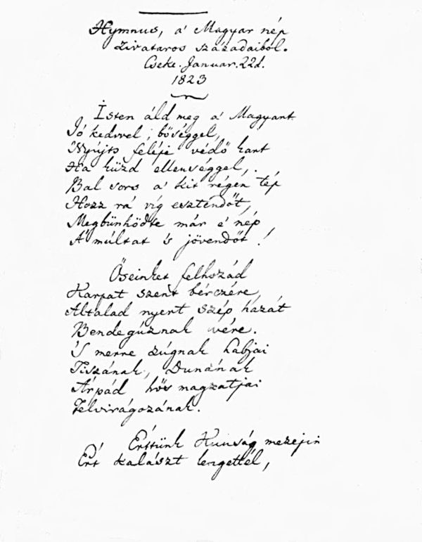 A Himnusz kéziratának első lapja